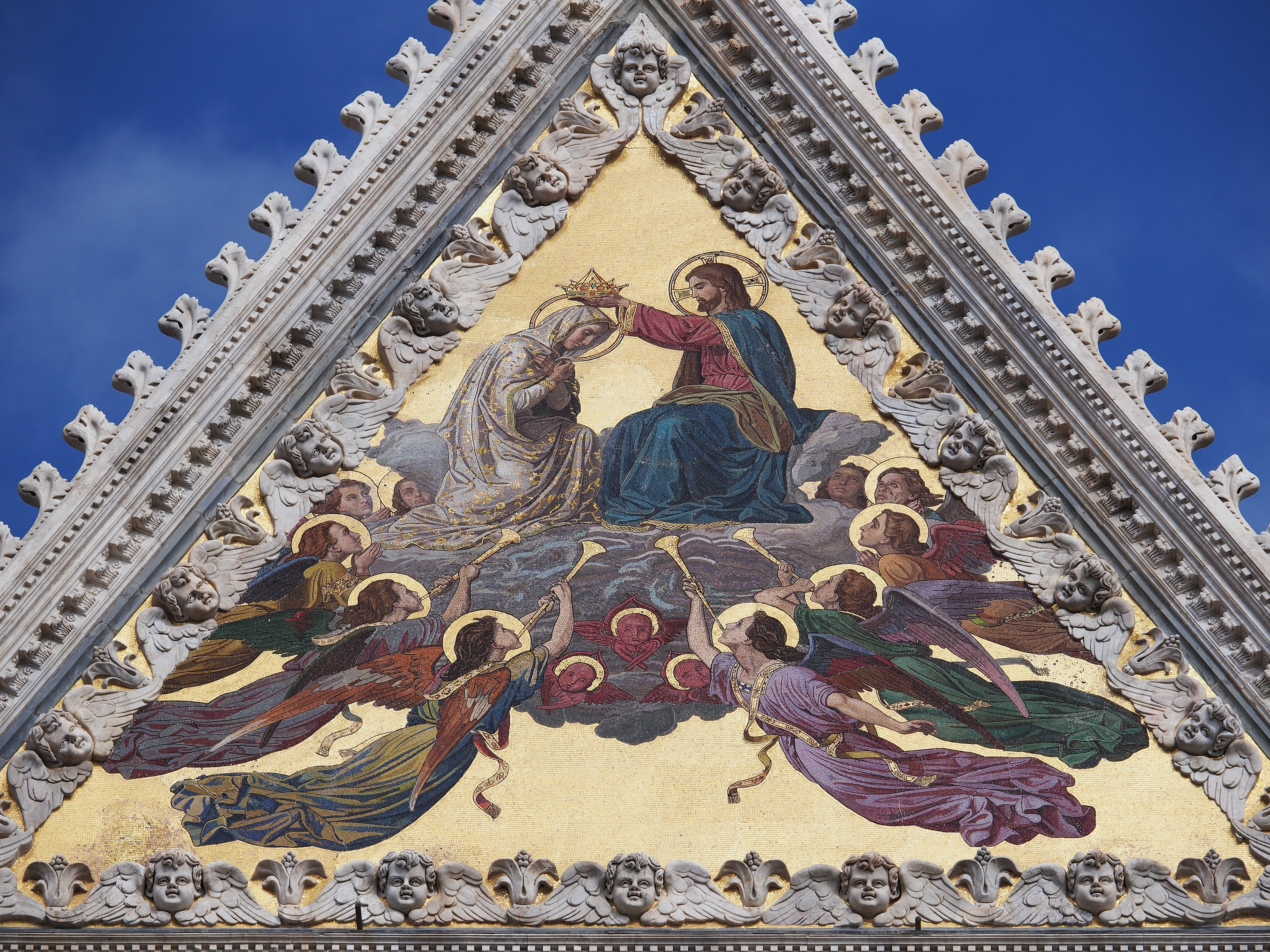 detail